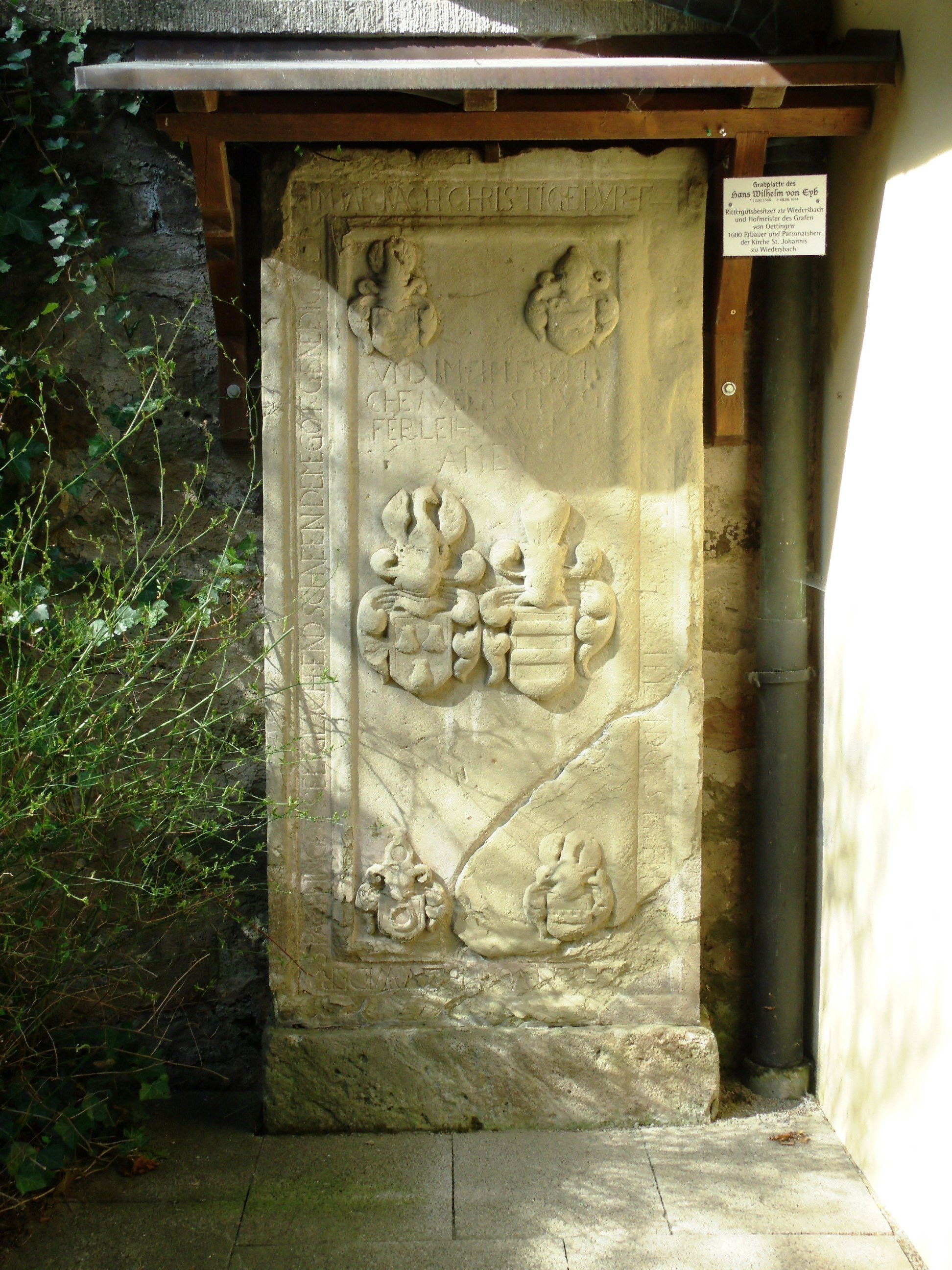 Wiedersbach, Ortsteil von Leutershausen im Landkreis Ansbach, Grabmal des Hans Wilhelm von Eyb an der Kirche